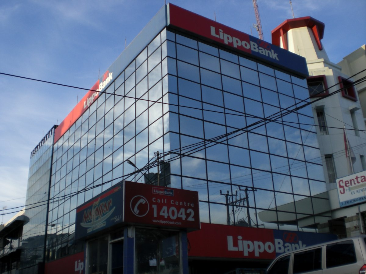 LippoBank branch in Makassar